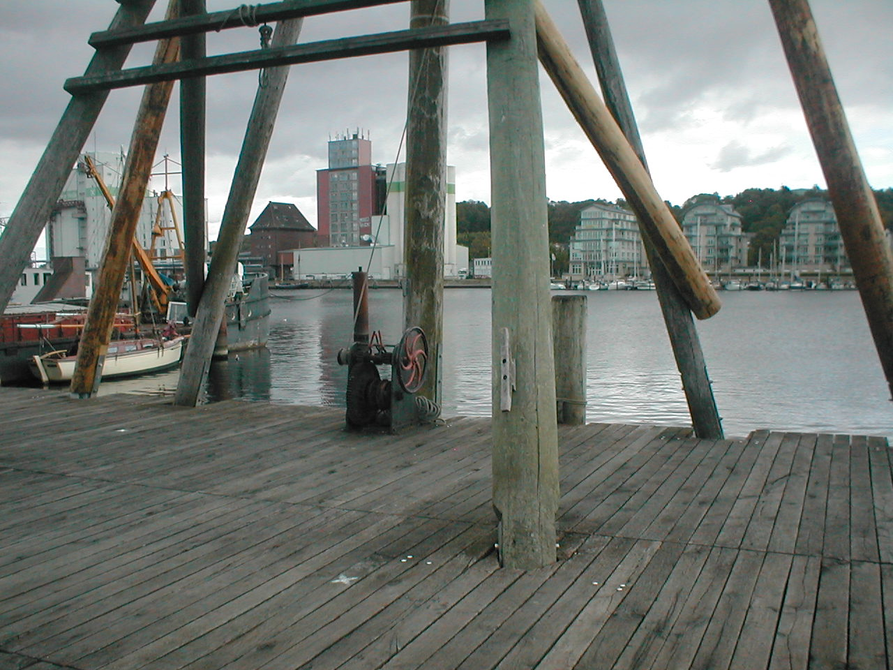 Winde für historischen Kran